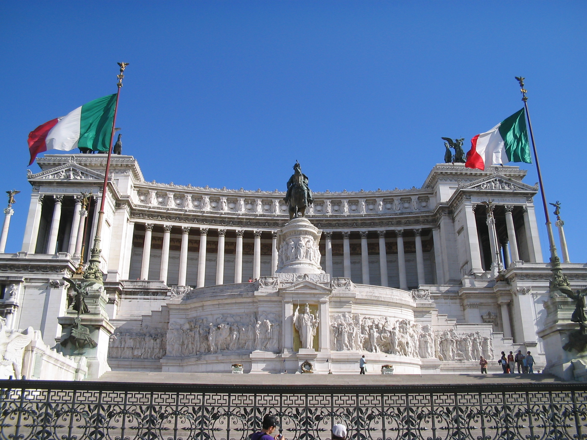 Il monumento a Vittorio Emanuele II, padre della patria Foto scattata da me a Roma il 30/05/06